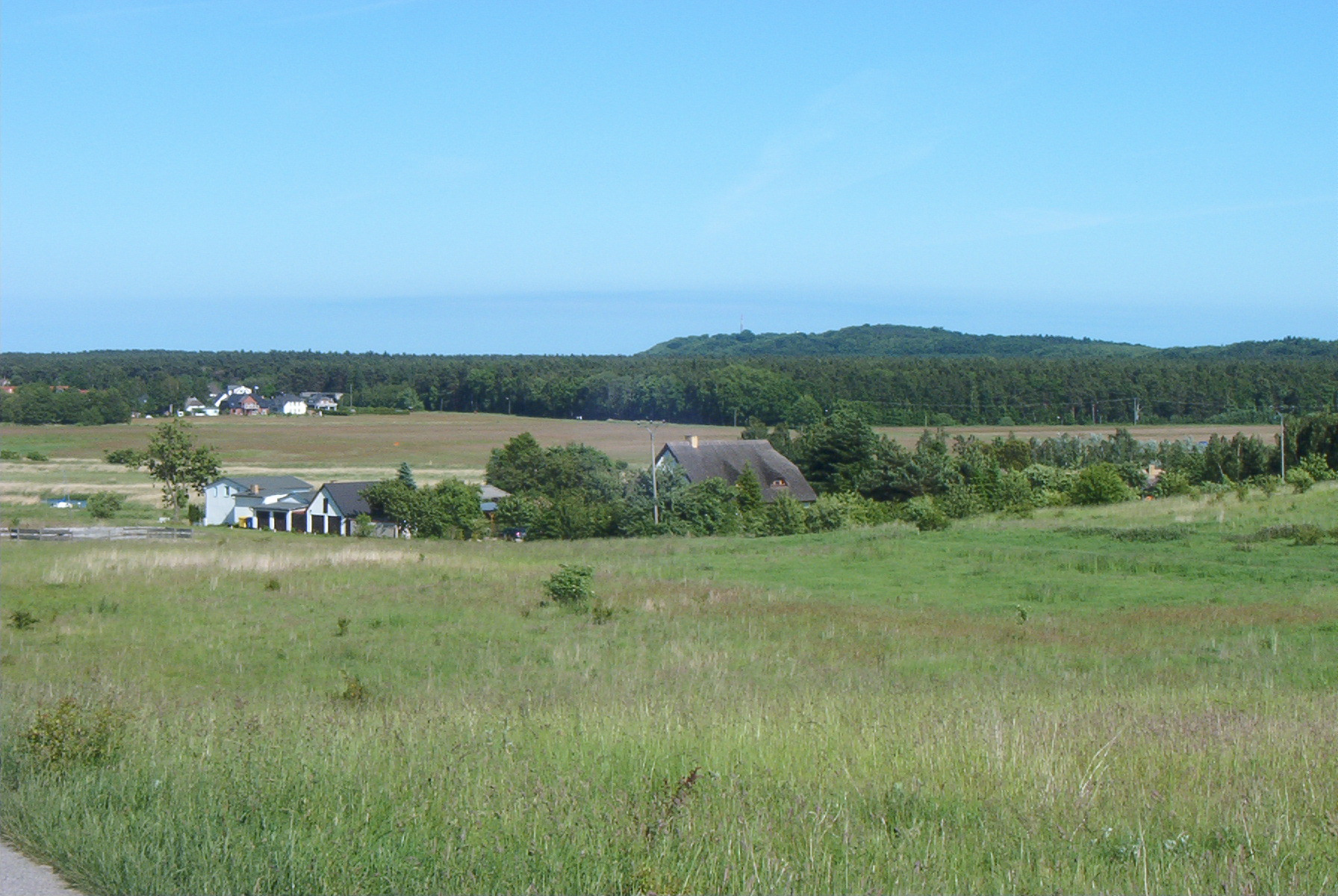 Moritzdorf, Nordseite, Bild aufgenommen am 18.6.2005 durch Olaf Meister